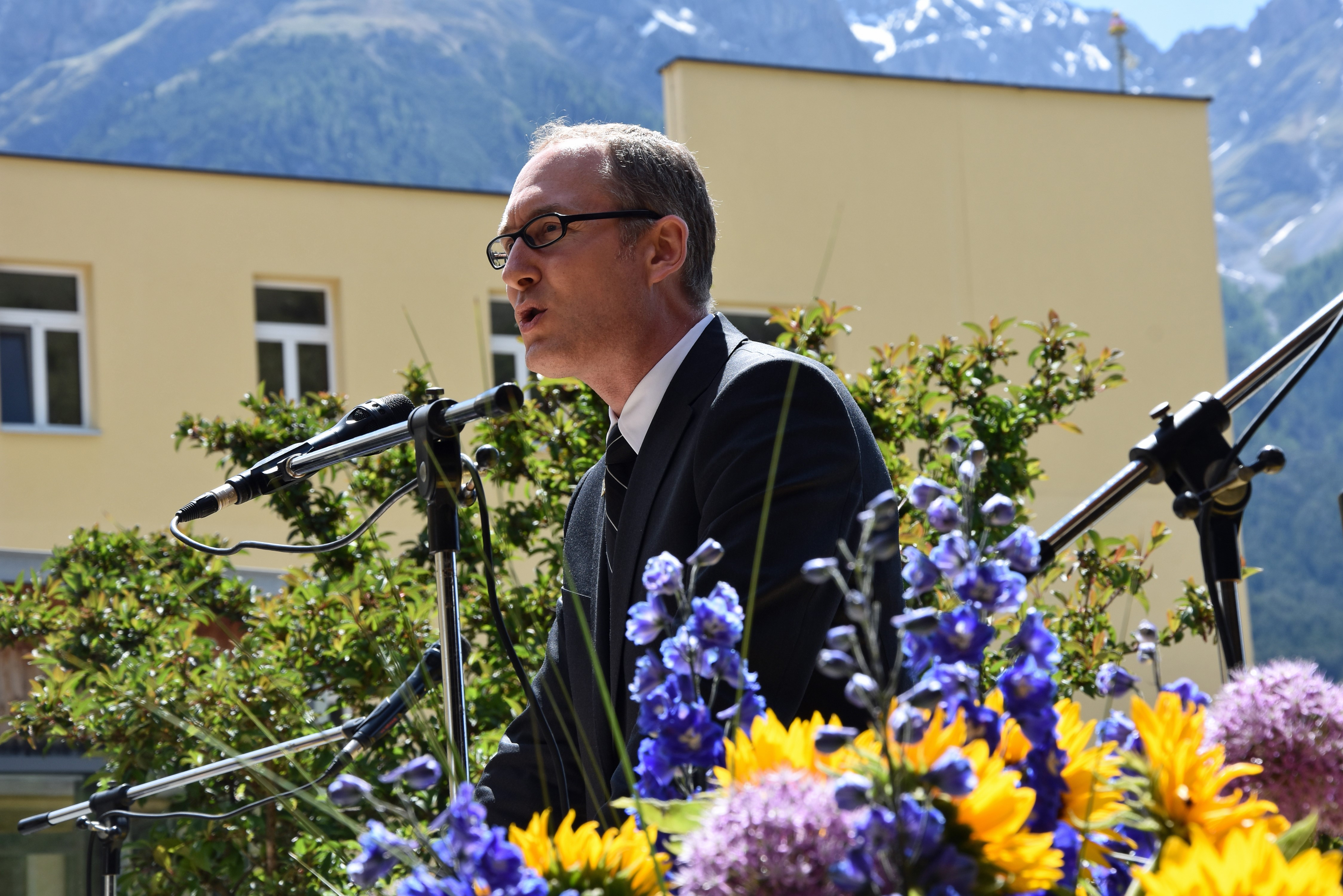 Rathgeb in Scuol - gespiegelt